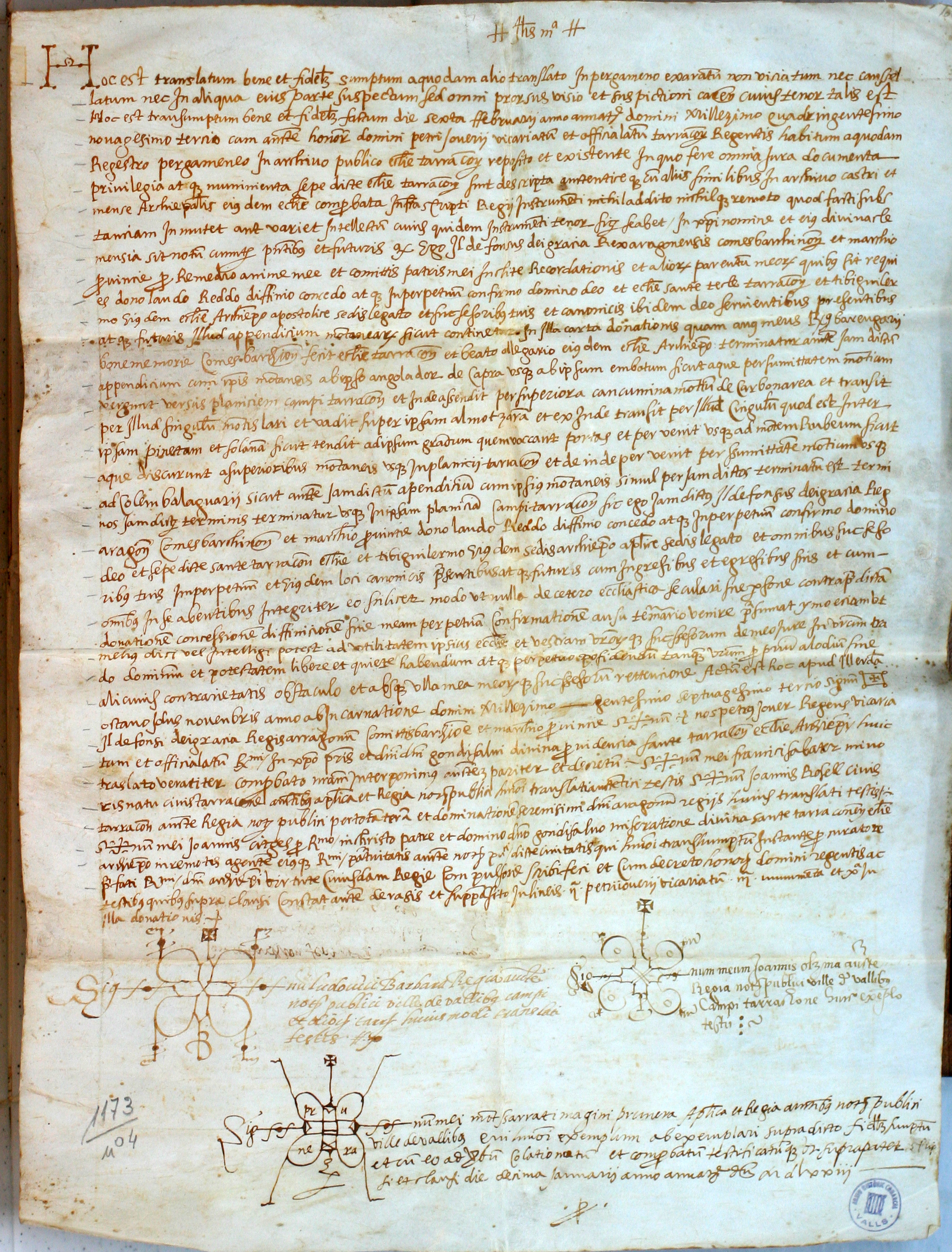 Títol: Alfons el Cast confirma a l'arquebisbe Guillem de Torroja la donació de la ciutat i el Camp de Tarragona feta pel seu avi, Ramon Berenguer III, a l'arquebisbe Oleguer. Data: Còpia notarial feta el 10 de febrer de 1573 d'un original datat a Lleida el 6 de novembre de 1173. Suport material: pergamí Mides: 345 x 460 mm